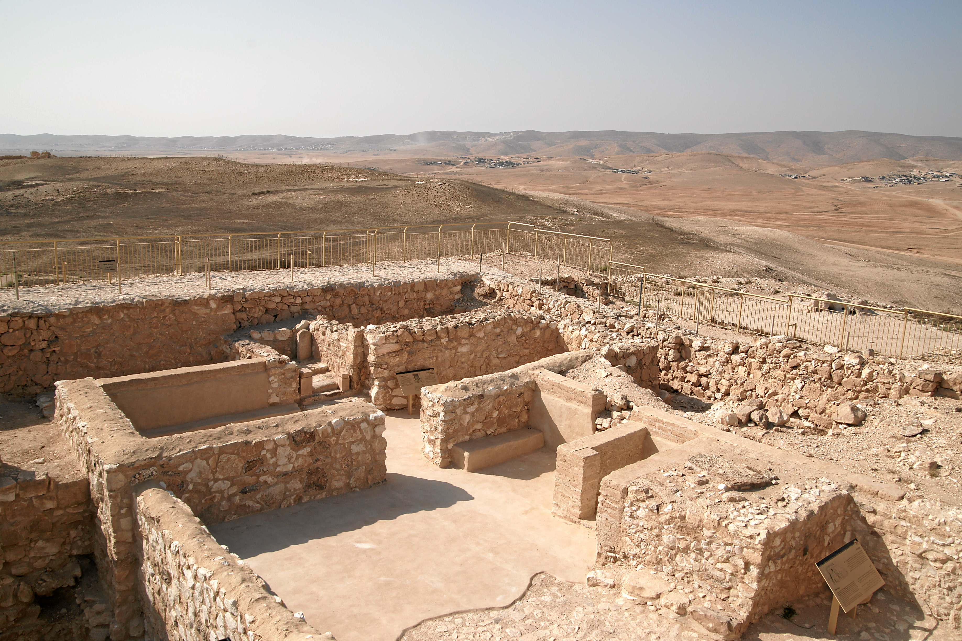 Tel Arad, Zitadelle: Tempelanlage